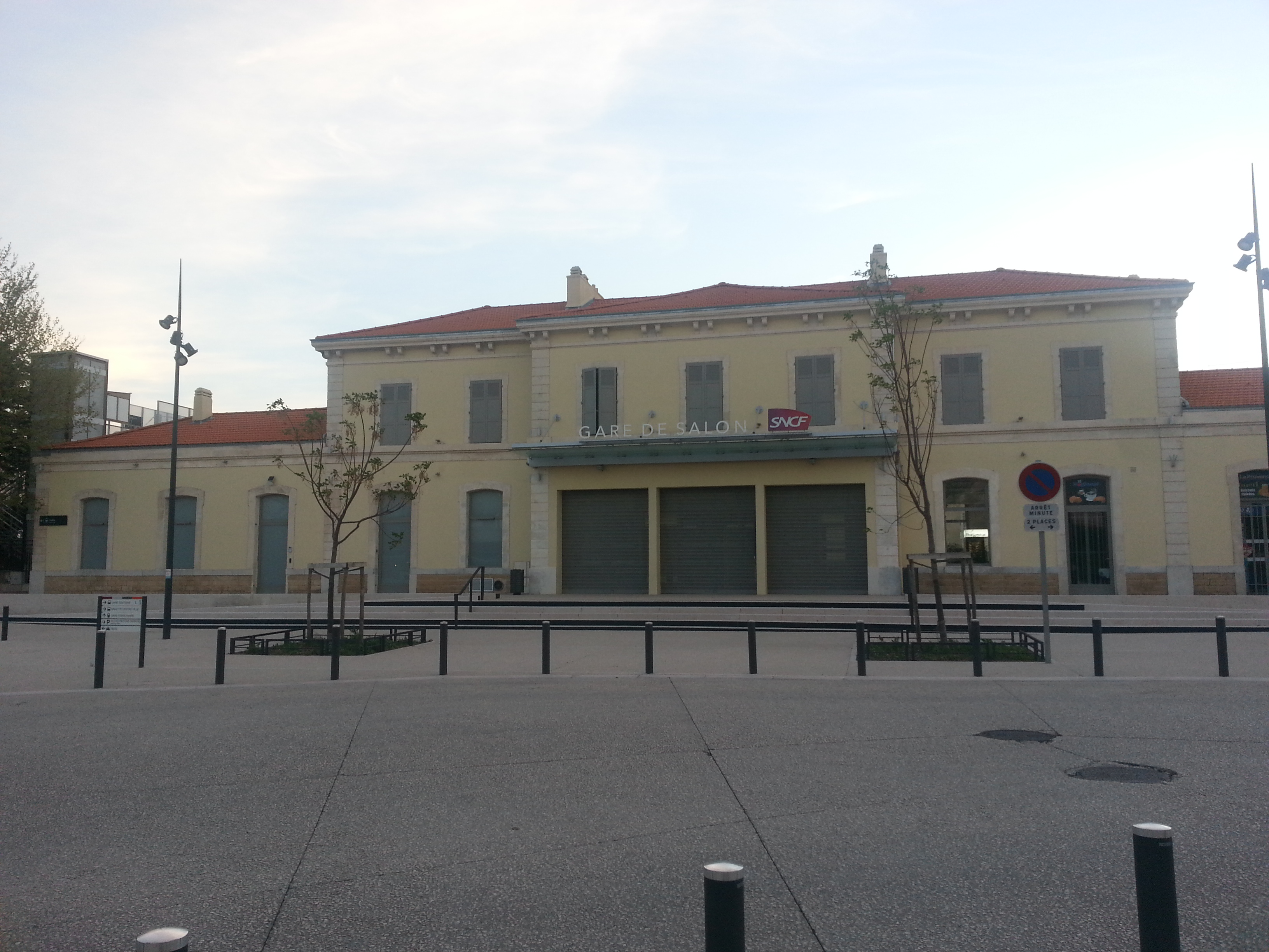 Photo prise en 2012